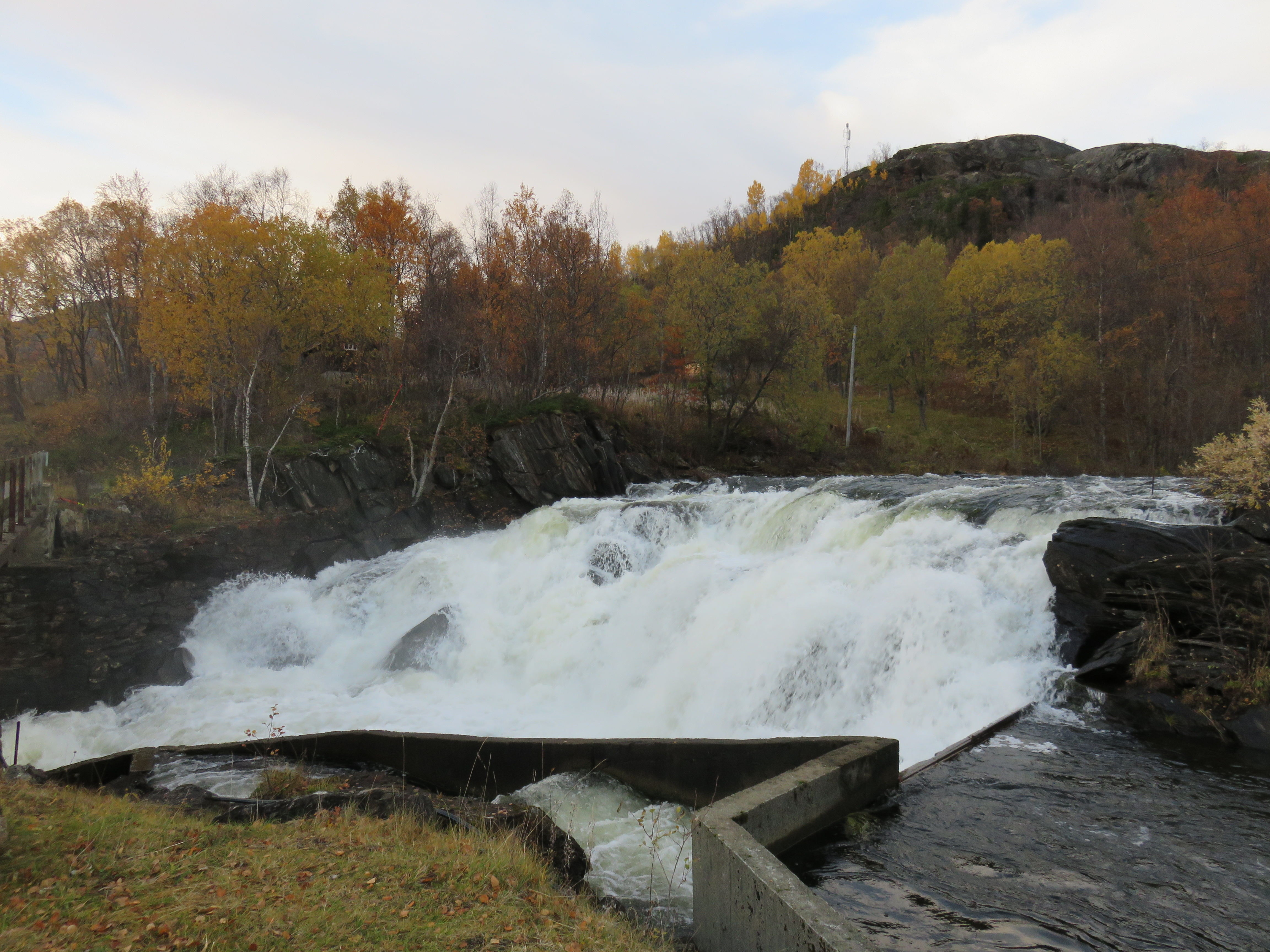 Forsaforsen i Forsa i Ballangen, Nordland. Ved fossens utløp til Forsahavet (ovenfor broen).